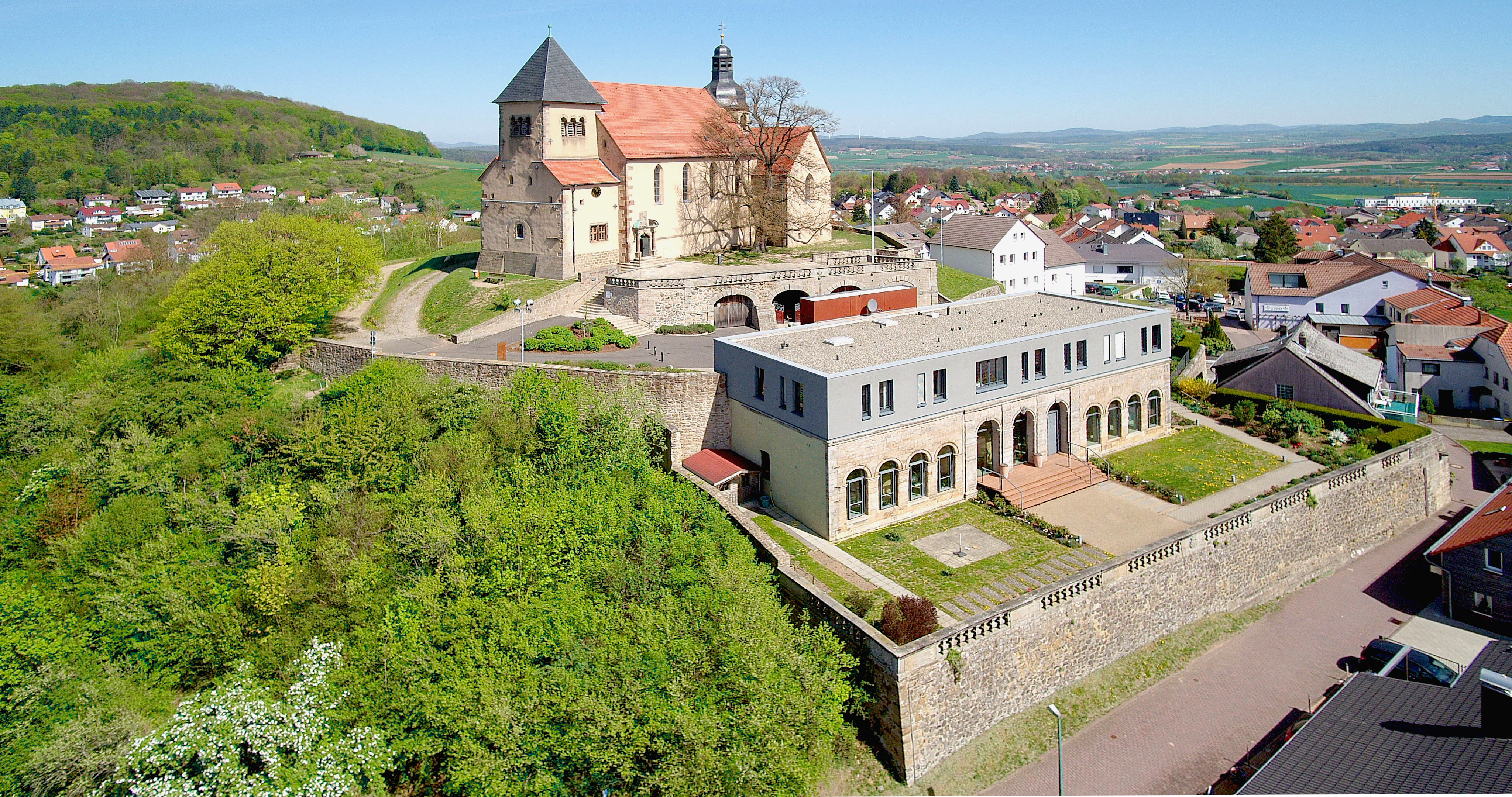 Liobakirche